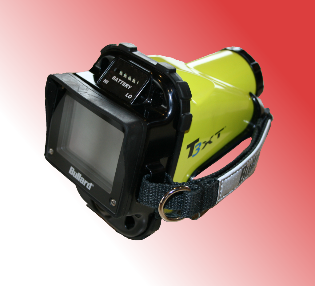 Wärmebildkamera T3xt Firma Bullard (Feuerwehr)